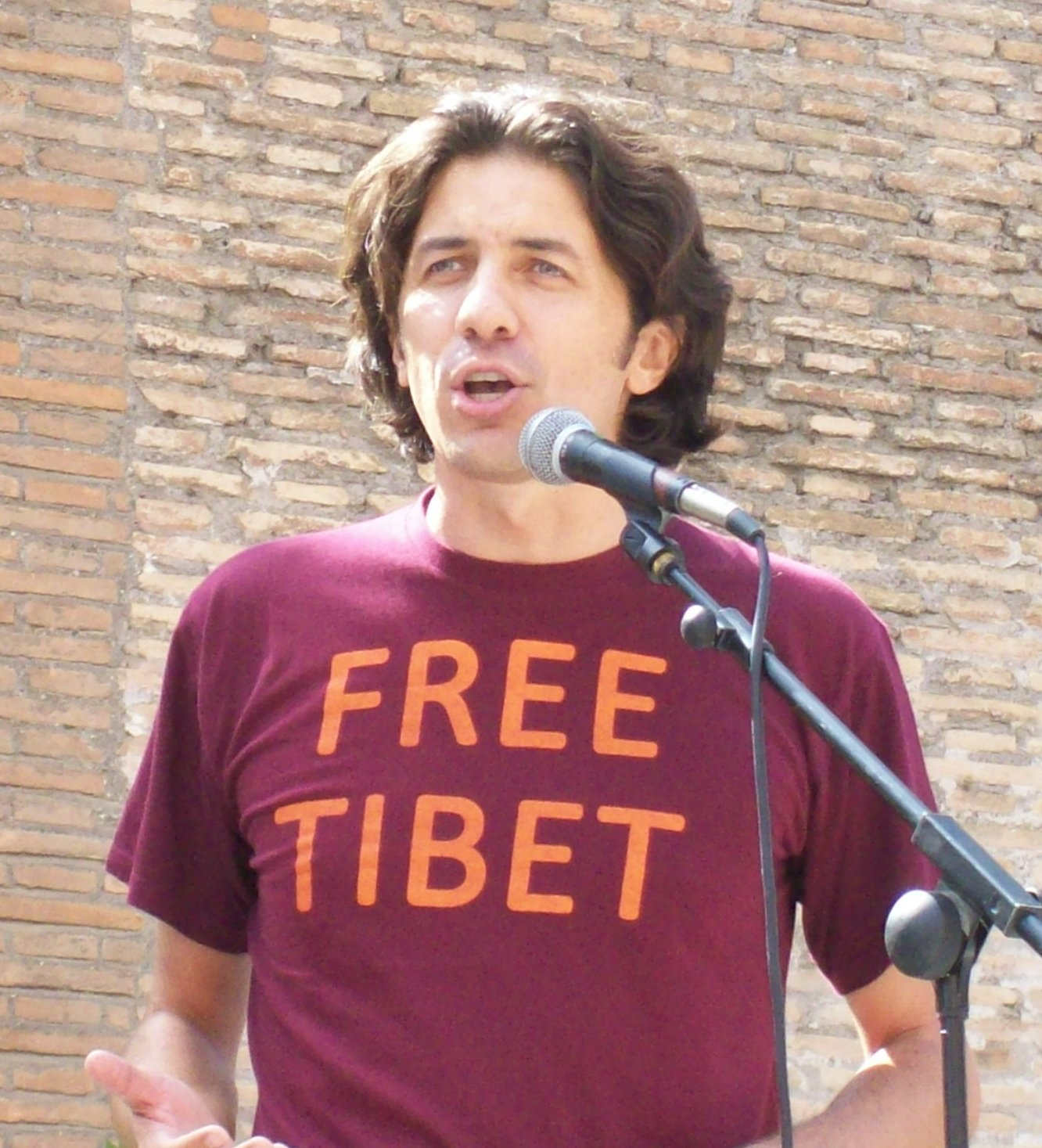 Manifestazione per il 140° anniversario della Presa di Roma: intervento di Marco Cappato